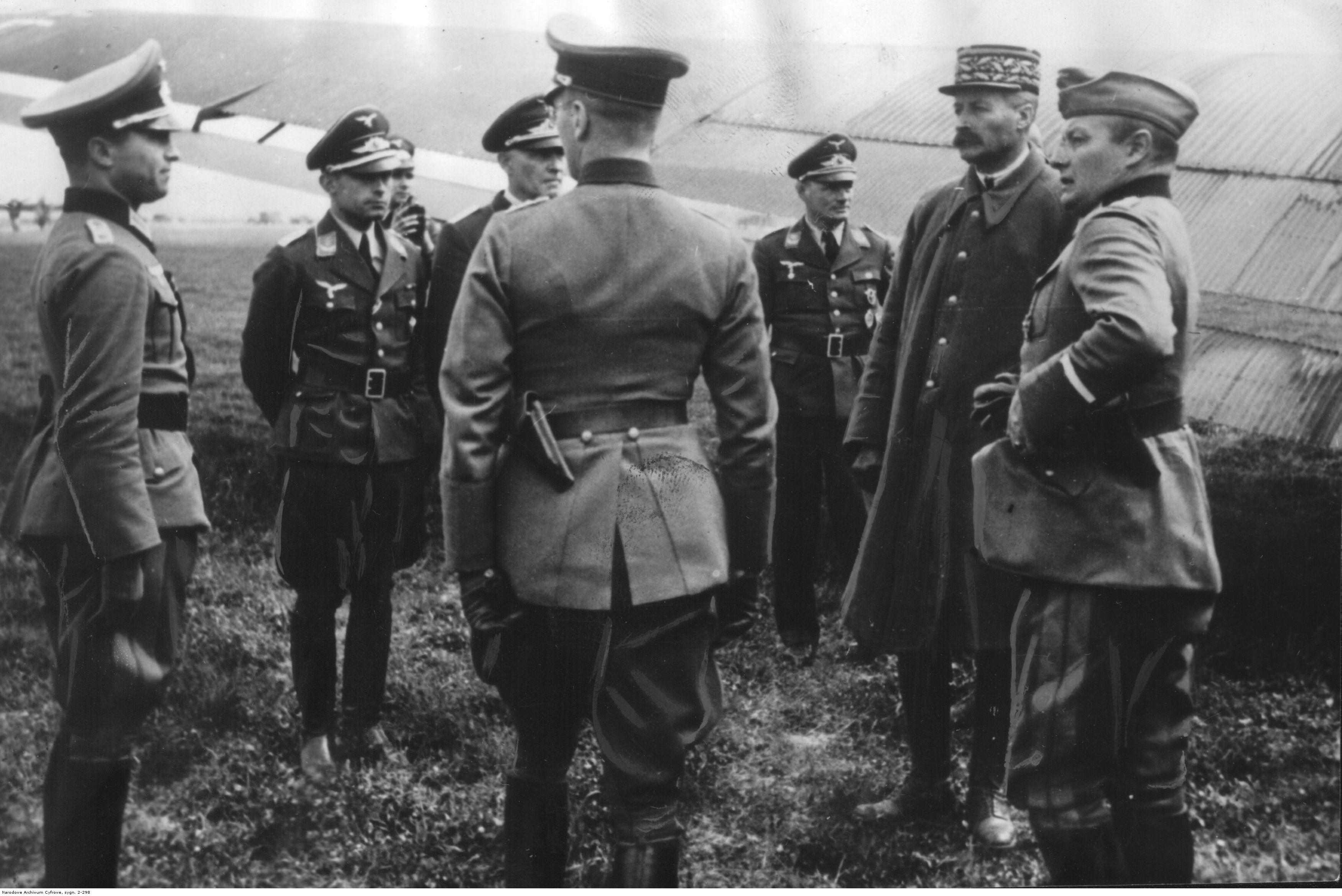 Francuski generał Henri Honore Giraud (2 z prawej) po wzięciu do niewoli na lotnisku. Dookoła generała niemieccy oficerowie.